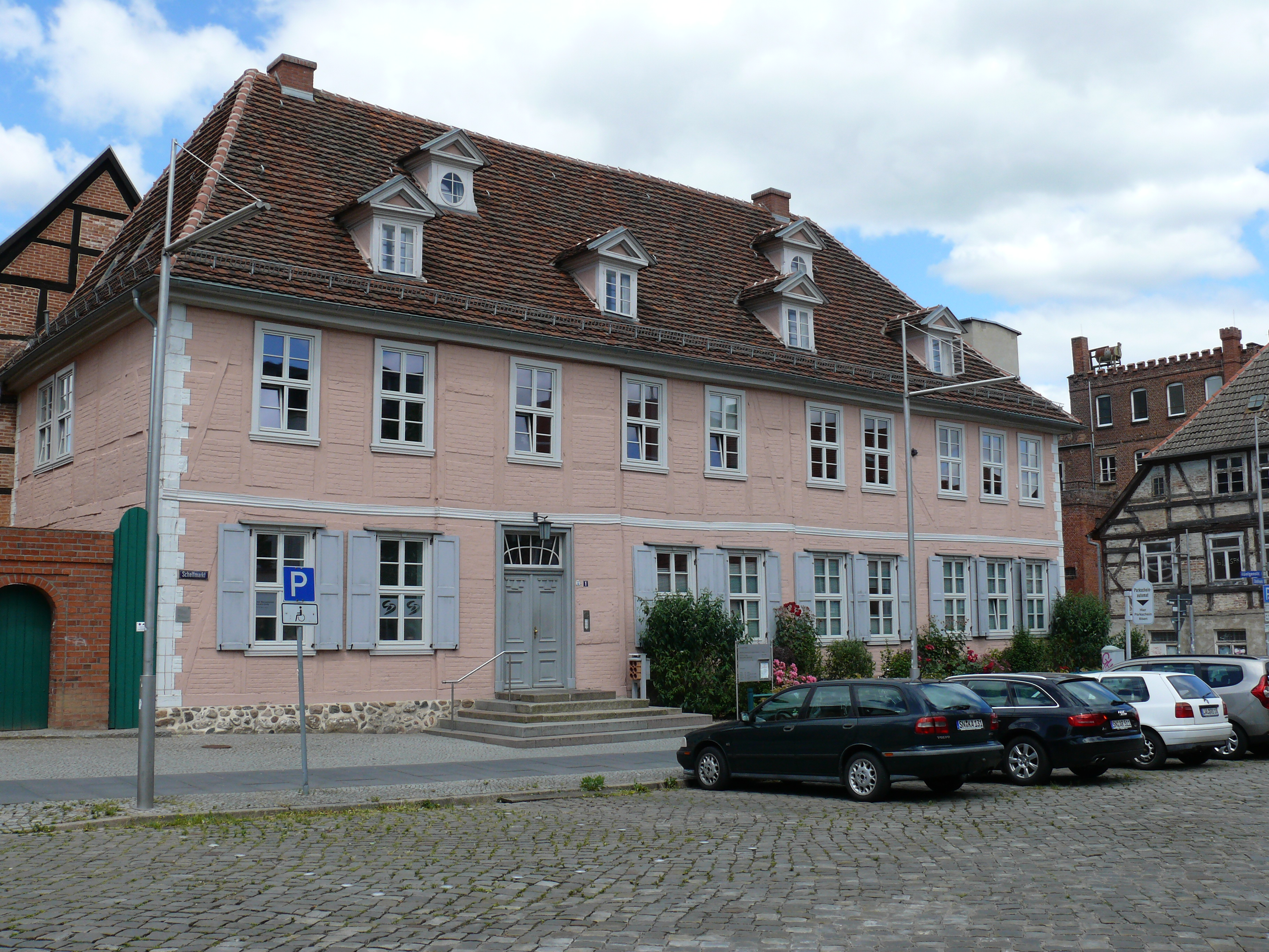 Das Gebäude "Schelfmarkt 1" in Schwerin.